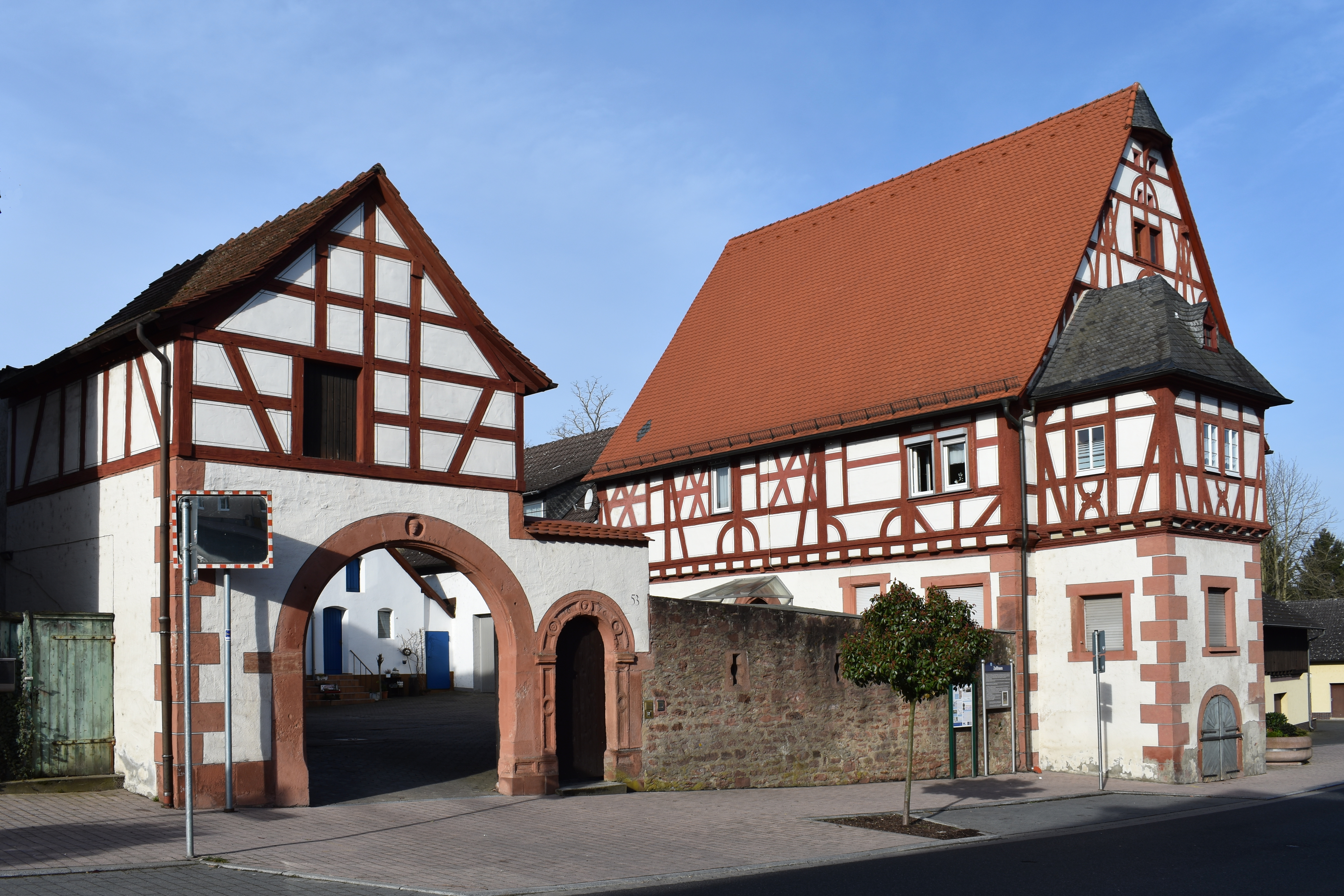 Zollhaus in Stockstadt am Main (Hauptstraße 53), durch Inschrift und Wappen Erzbischofs Albrecht von Brandenburg auf das Jahr 1546 datiert. Ansicht von Osten.